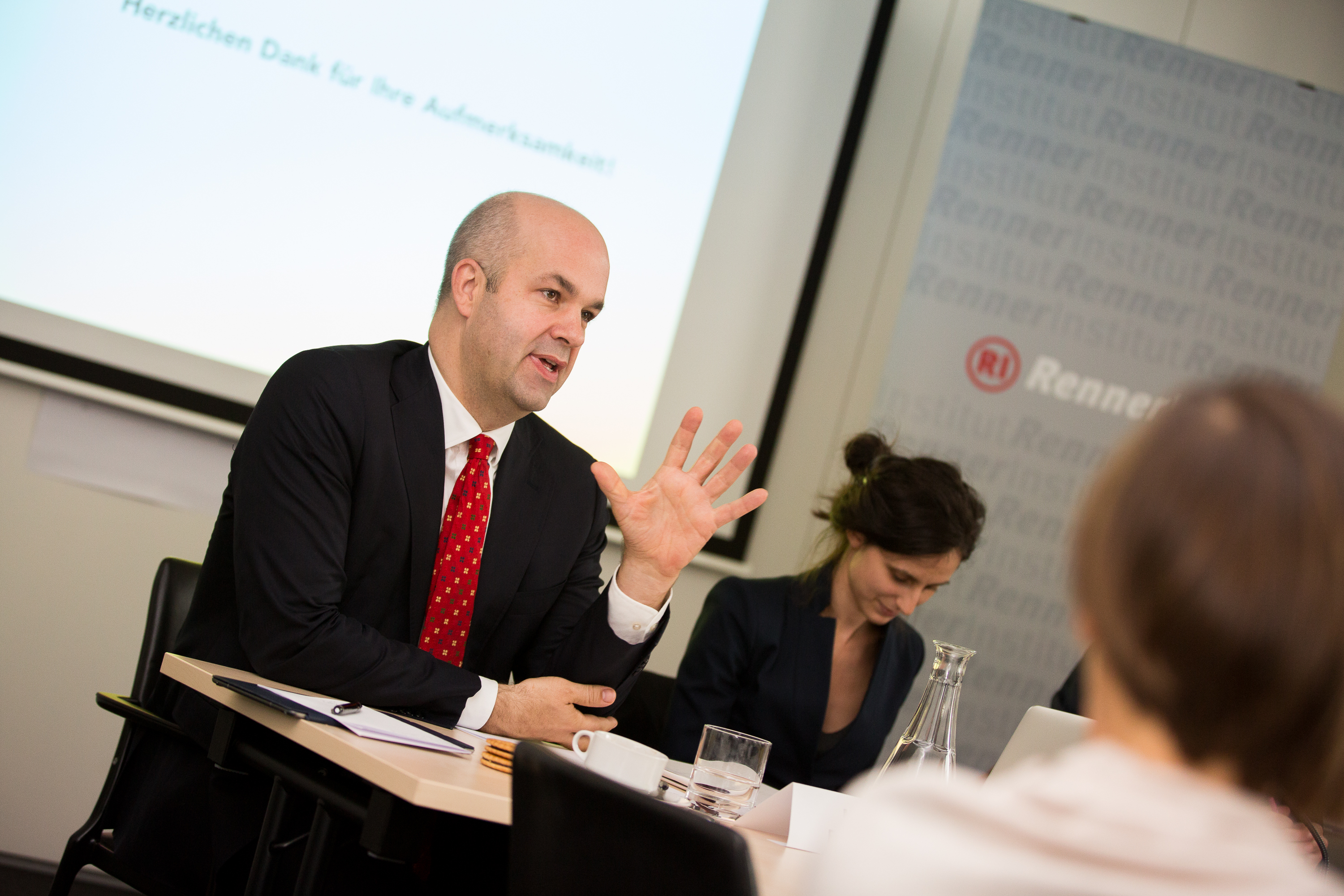 ExpertInnen Austausch anlässlich der Kurt Rothschild Preisverleihung, 27.09.2017